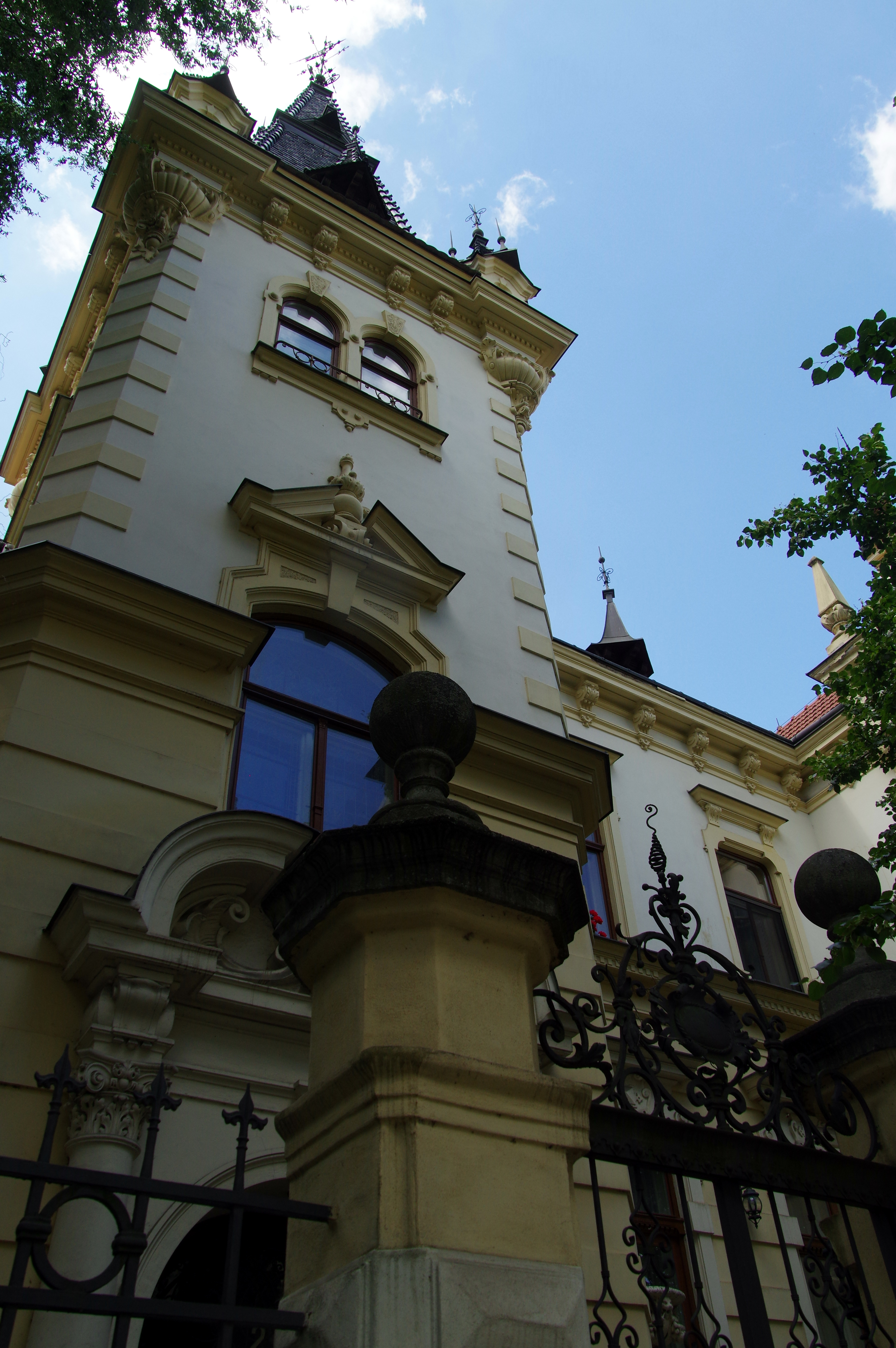 Vídeňská 632/2, Olomouc, vila Eduarda Hamburgera